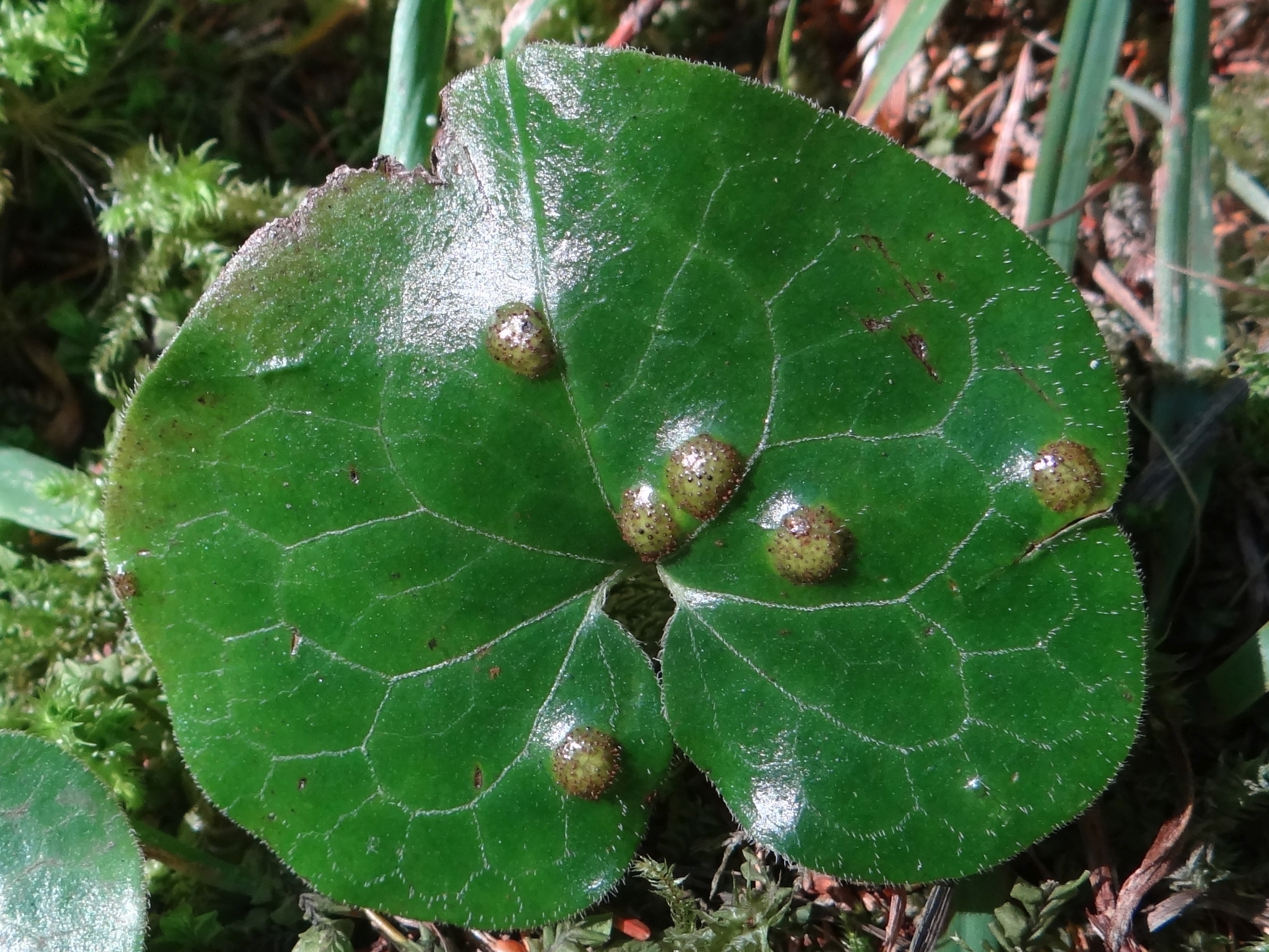 Puccinia asarina on Asarum europaeum (location: Slovakia, Słowacki Raj)